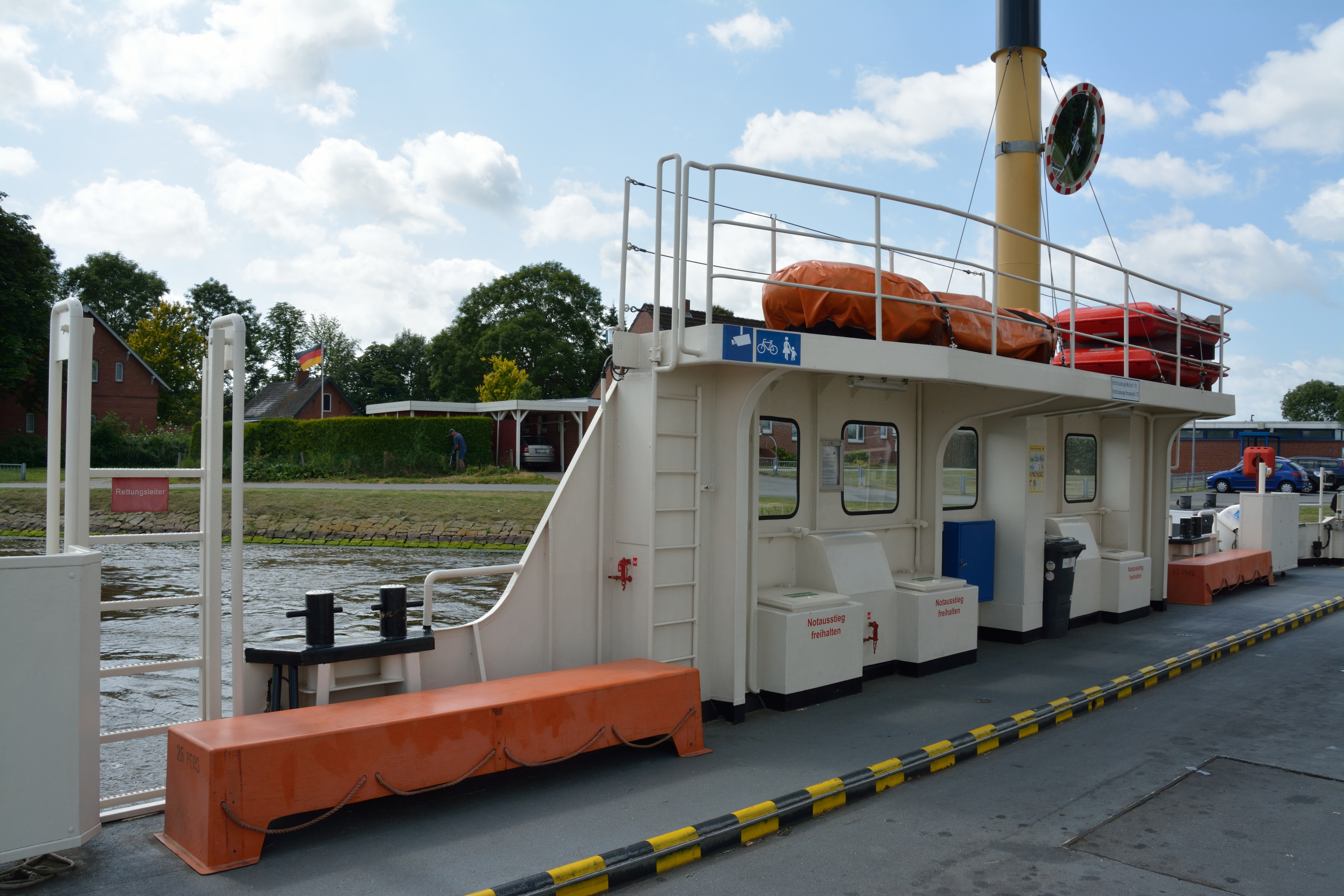 Fähre "Stralsund" über den Nord-Ostsee-Kanal in Breiholz. Die Fähre ist im Probebetrieb für "Ein-Mann-Bedienung". Die Beobachtung des Decks erfolgt über einen Konvexspiegel durch den "Kapitän, Fährmann, Whatever". Manuell ausklappbare Rettungsflöße durch den "Decksmann" gibt es nicht mehr, eine Rettungsleiter und automatische Rettungsflöße sollen ihn ersetzen.